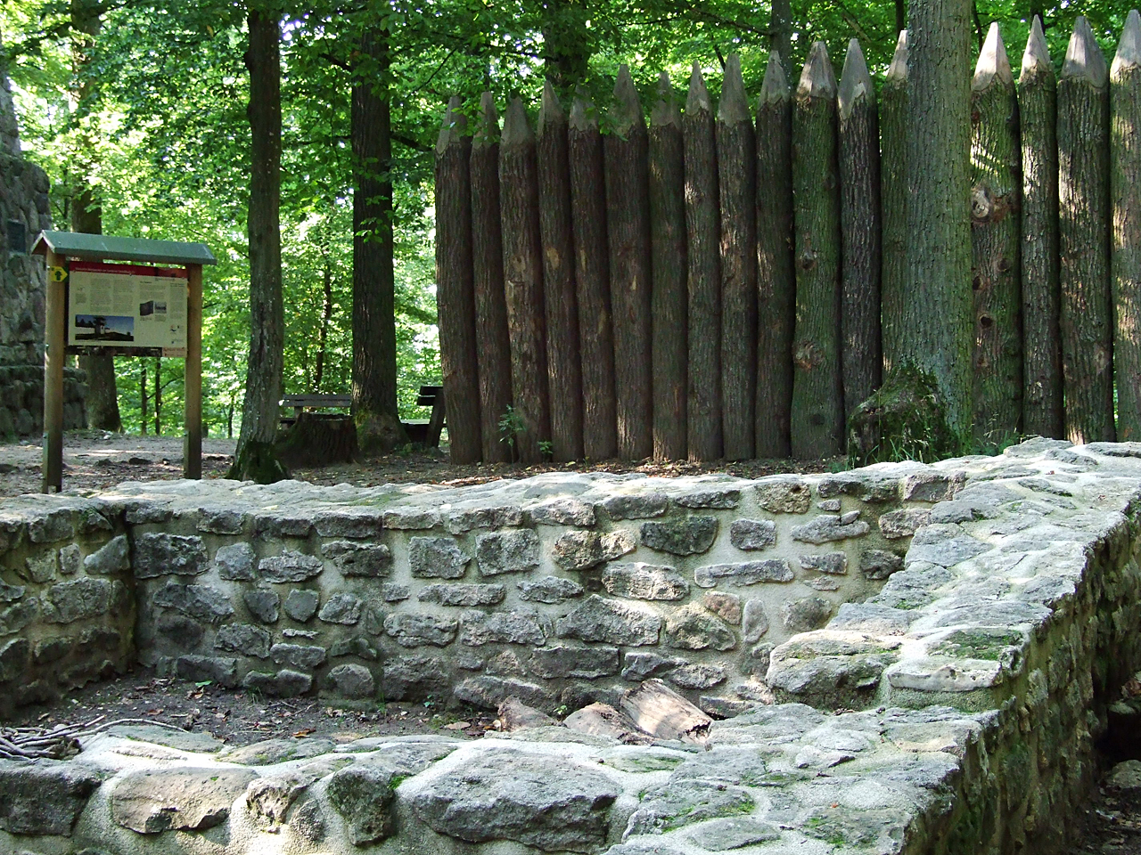 Limeswachposten am Vorderen Schloßbuck - Burgstallwald Gunzenhausen